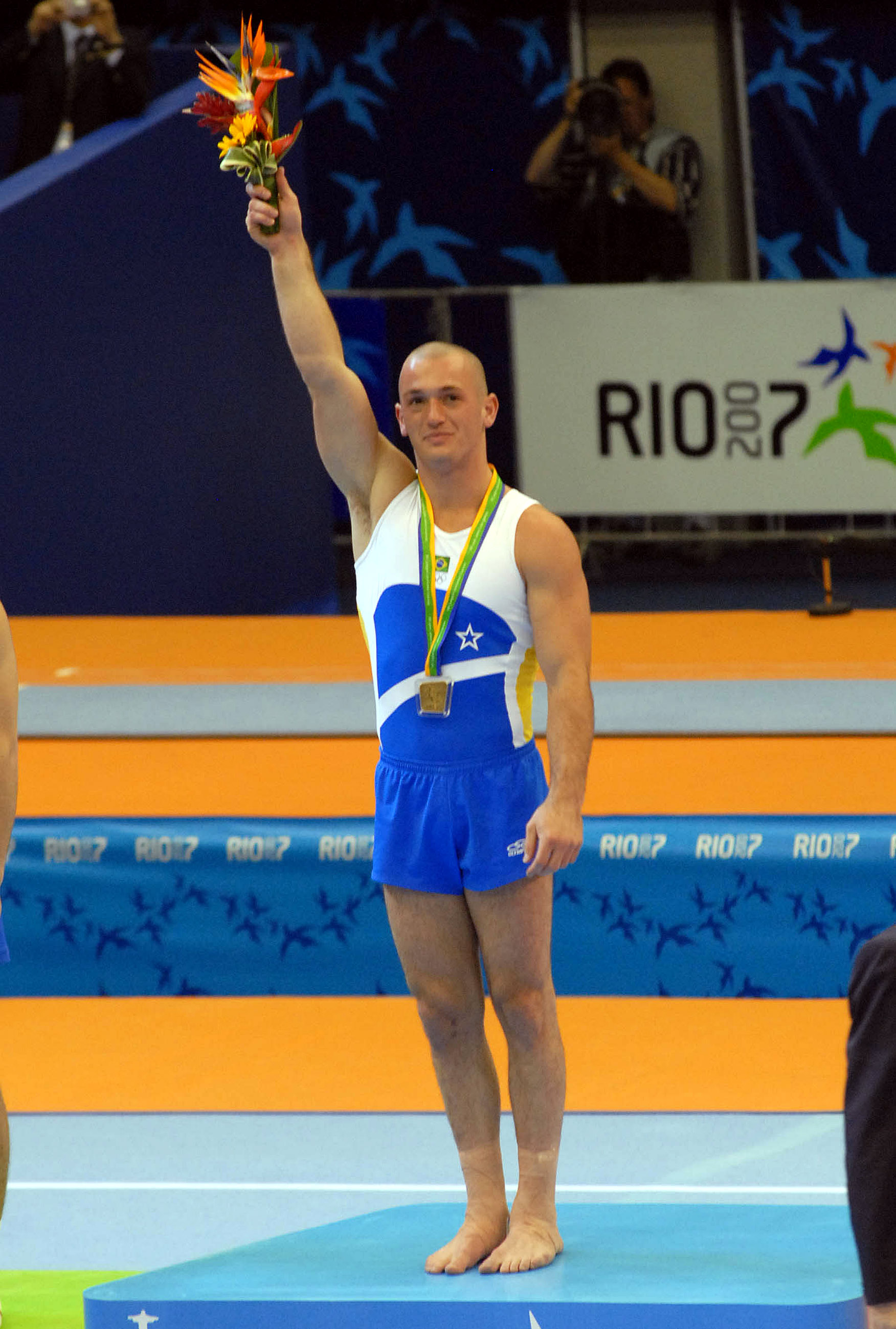 Rio de Janeiro - Diego Hypólito saúda o público após ganhar duas medalhas de ouro nos Jogos Panamericanos de 2007.